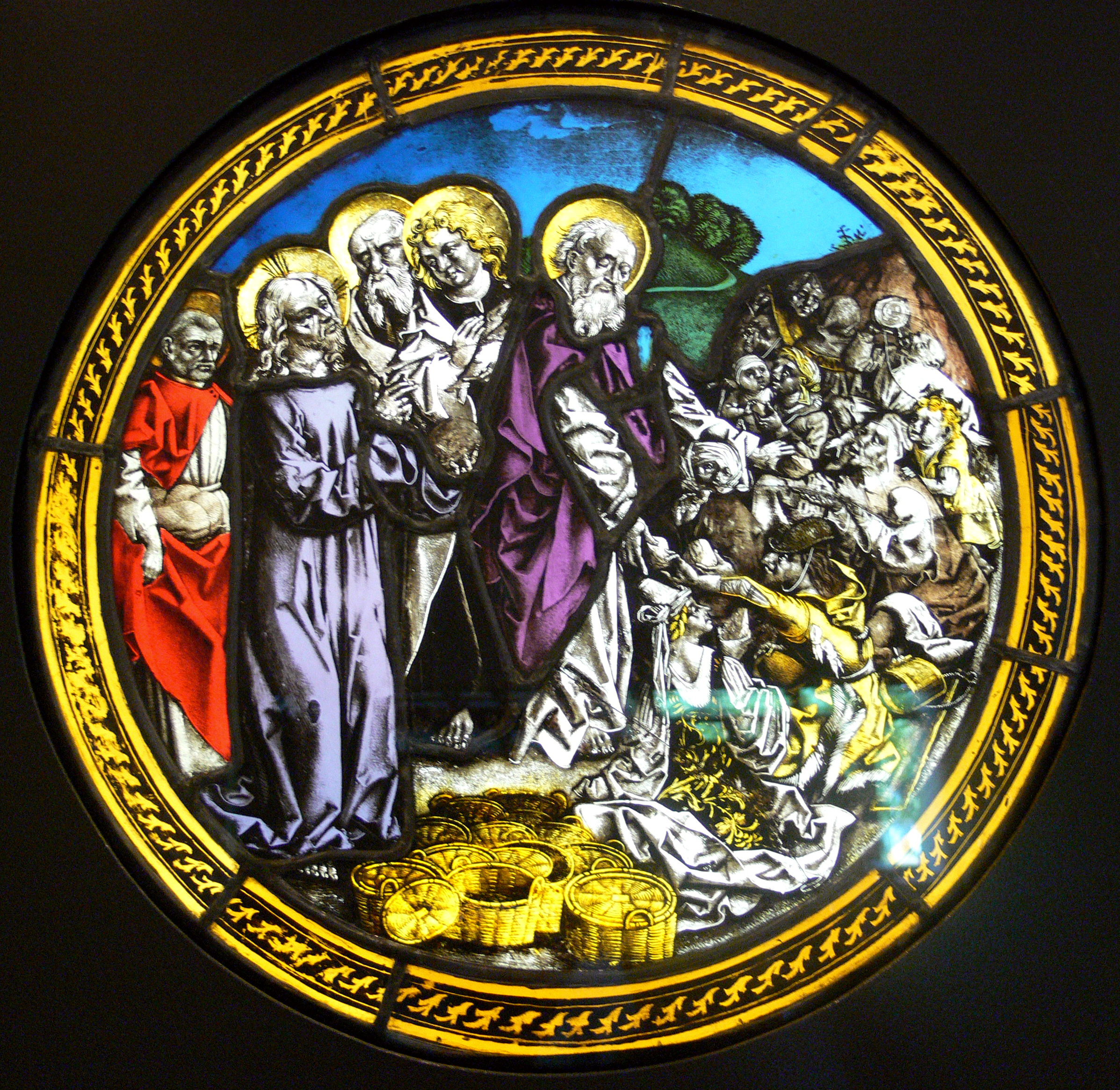 Die Speisung der Fünftausend Rundscheibe aus der Gräflich Erbach'schen Sammlung auf Schloss Erbach im Odenwald; ursprünglich wohl für das Rathaus in Ulm geschaffen; Straßburg (Peter Hemmel?), um 1480 Kunstgewerbemuseum Berlin, Inv. Nr. Æ 563